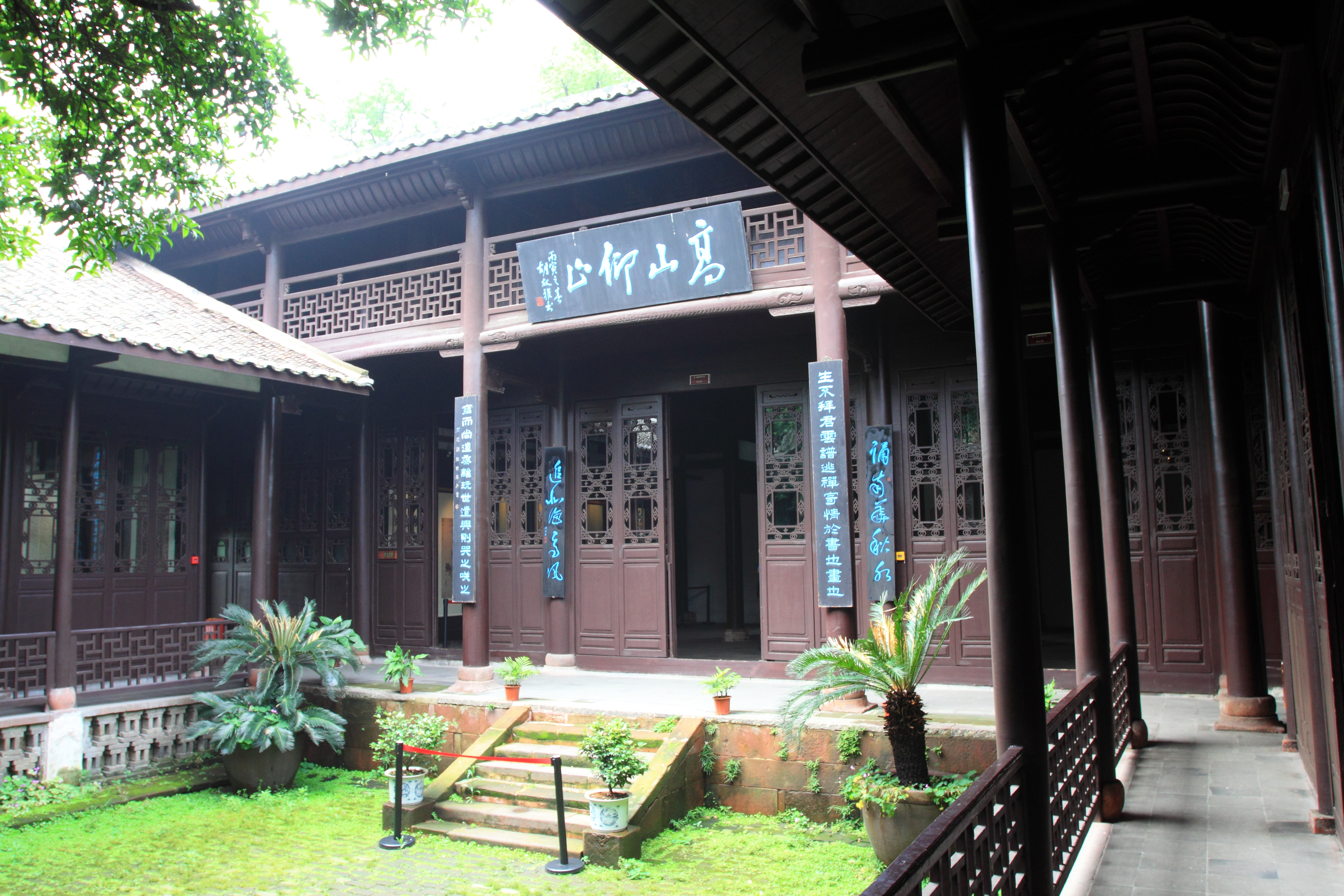 八大山人纪念馆（青云谱），位于中国江西省南昌市。